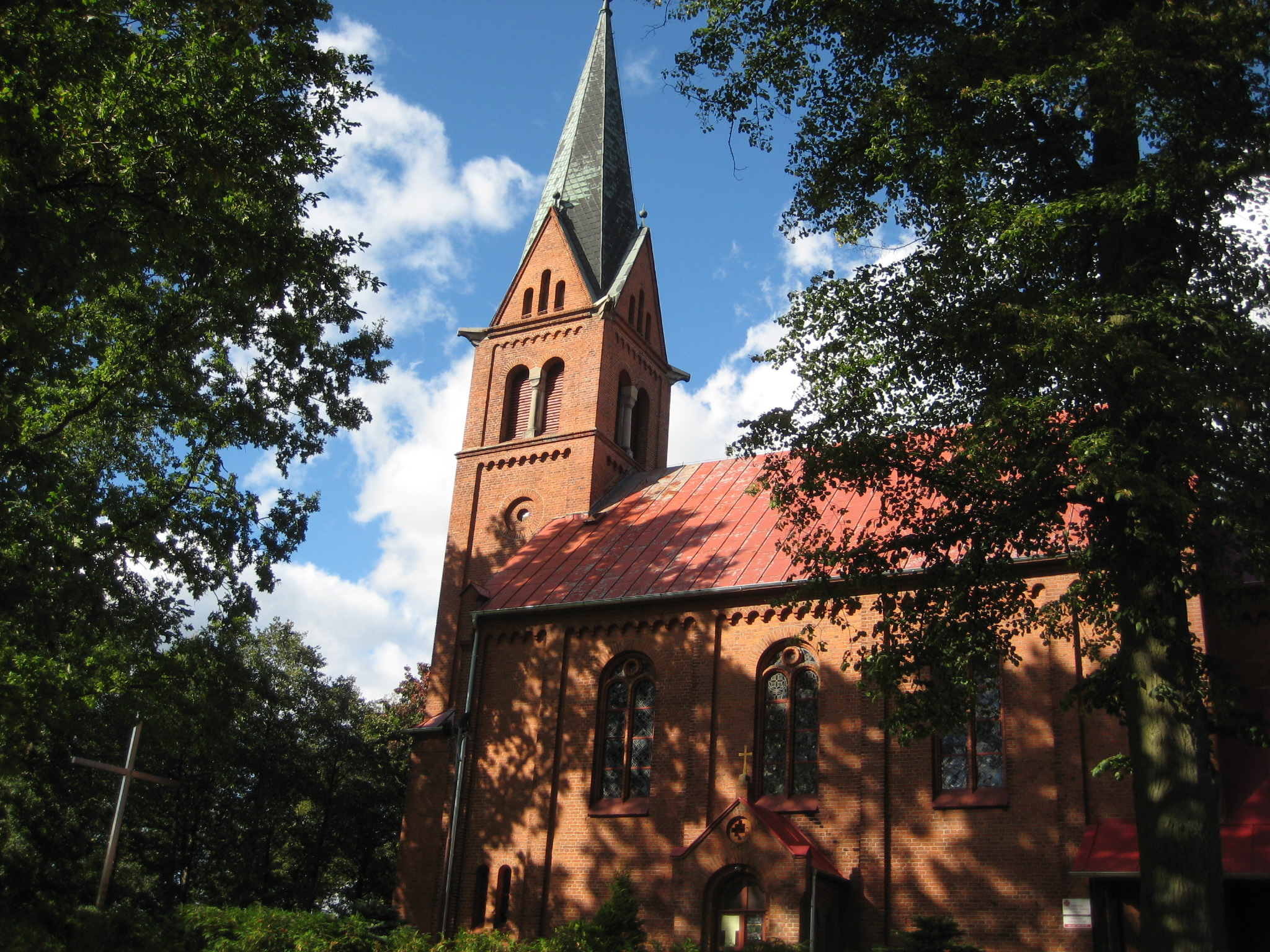 Kirche Freudenfier